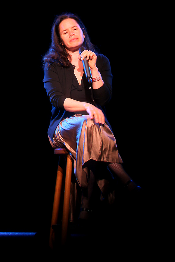 Natalie Merchant in der Kulturkirche Köln 2010